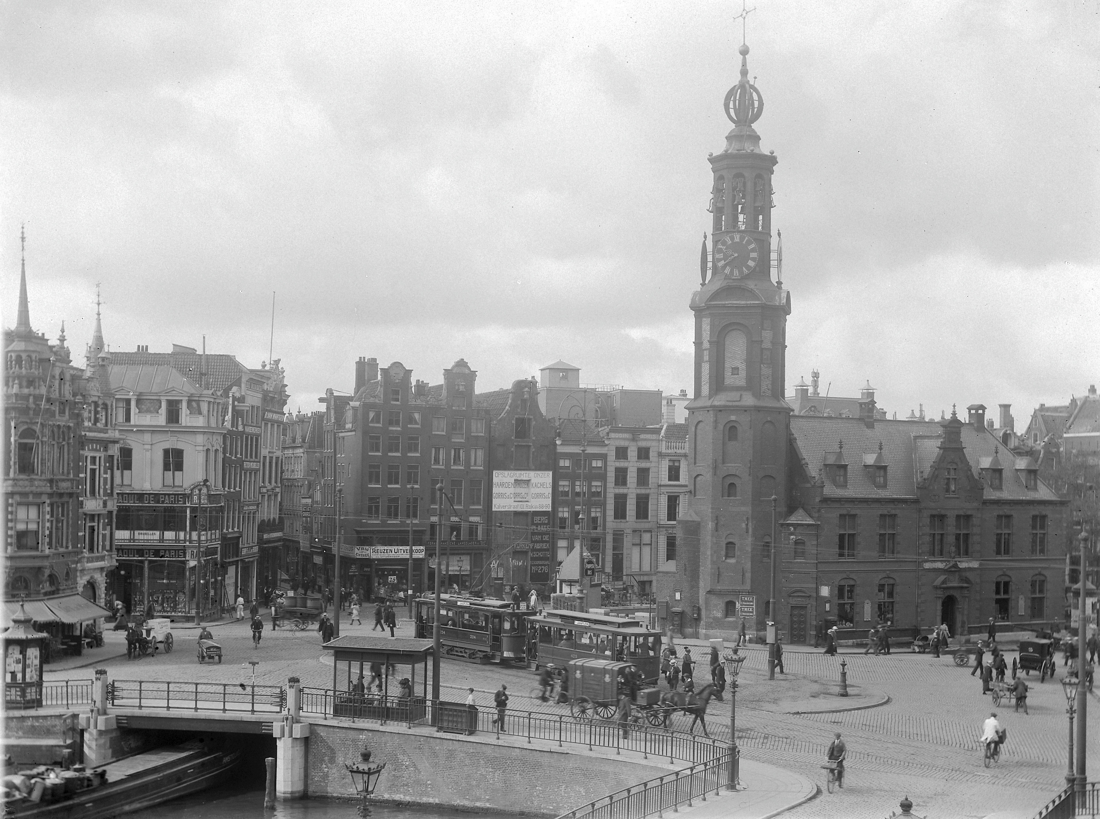 Munttoren: Overzicht toren met plein (opmerking: In: Buiten ; 11(1917), nr. 3, p. 35)